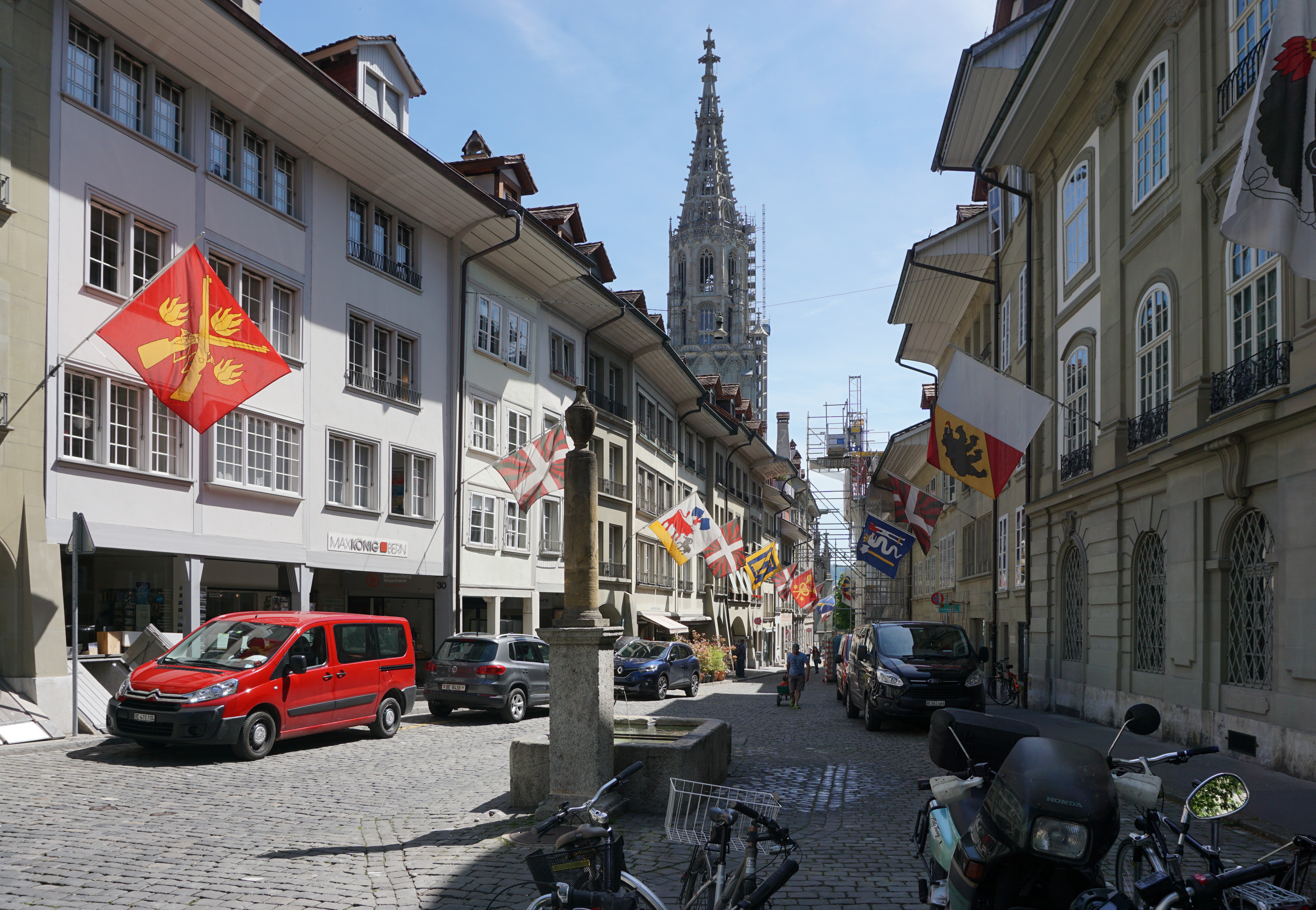 Herrengasse von Kasino zum Münster